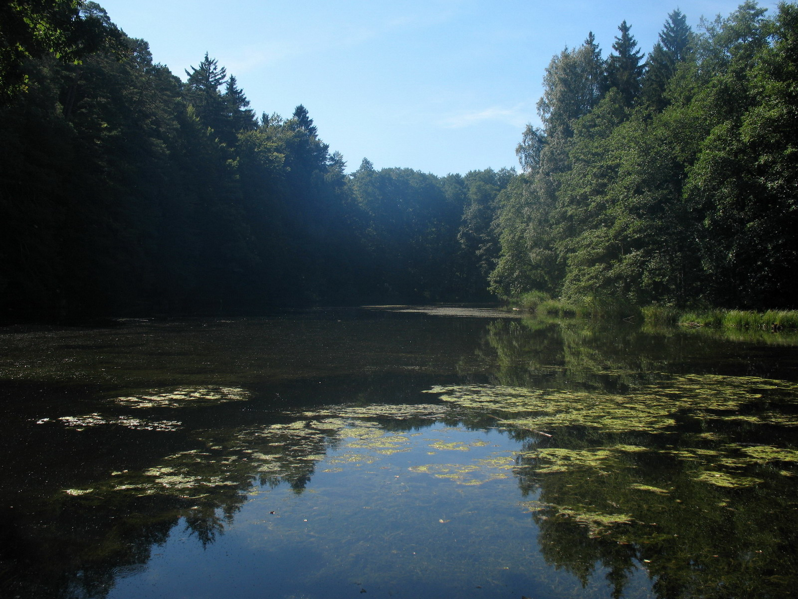 Ein Weiher im Wald zwischen Maselheim und Schönebürg, angelegt für das Kloster Heggbach.